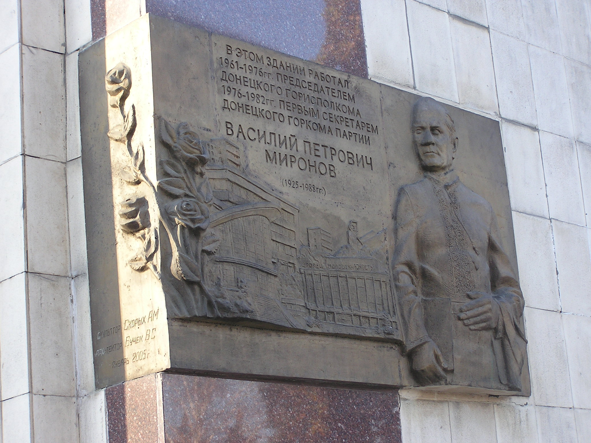 Донецк. Миронов, Василий Петрович